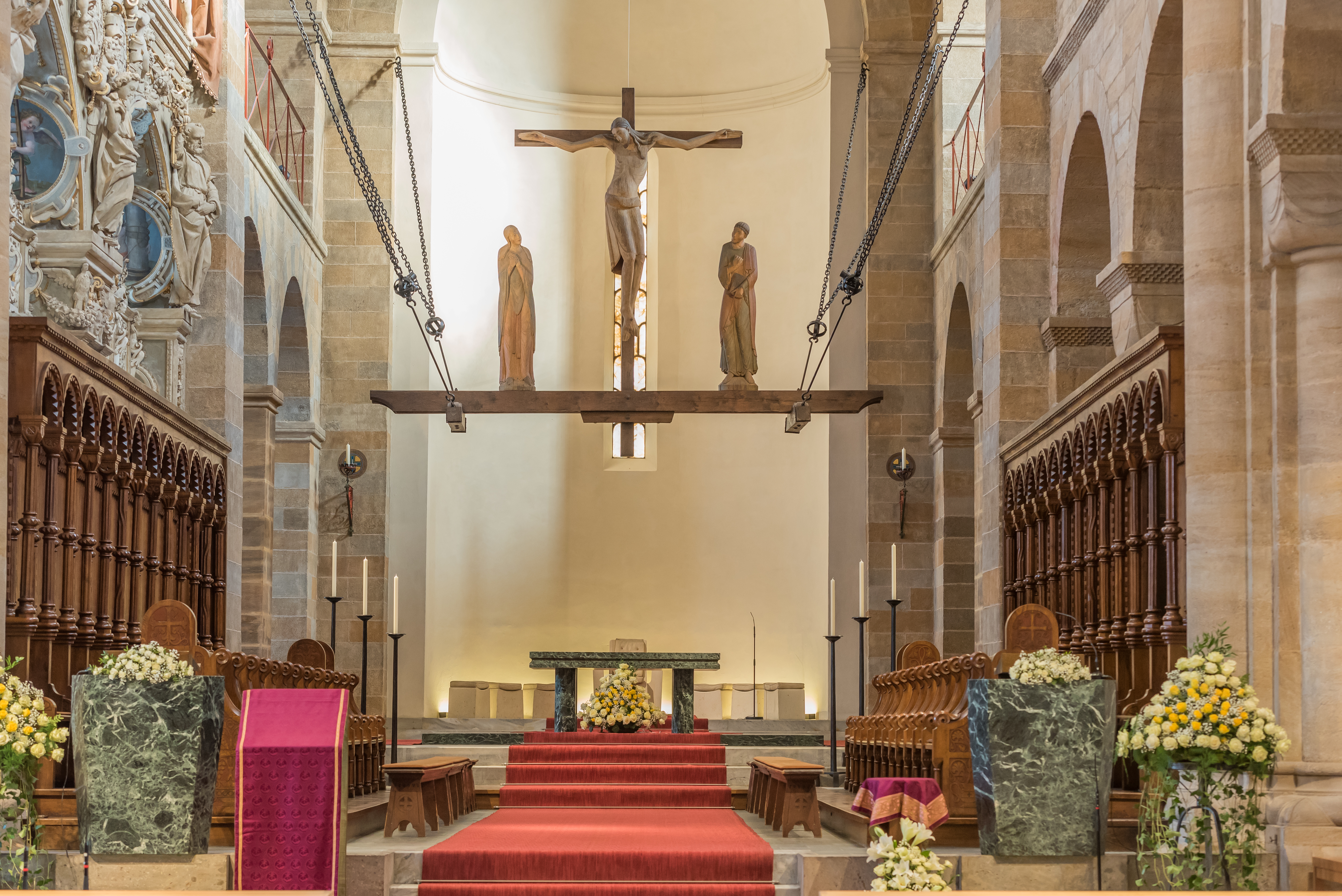 © Michael Regner